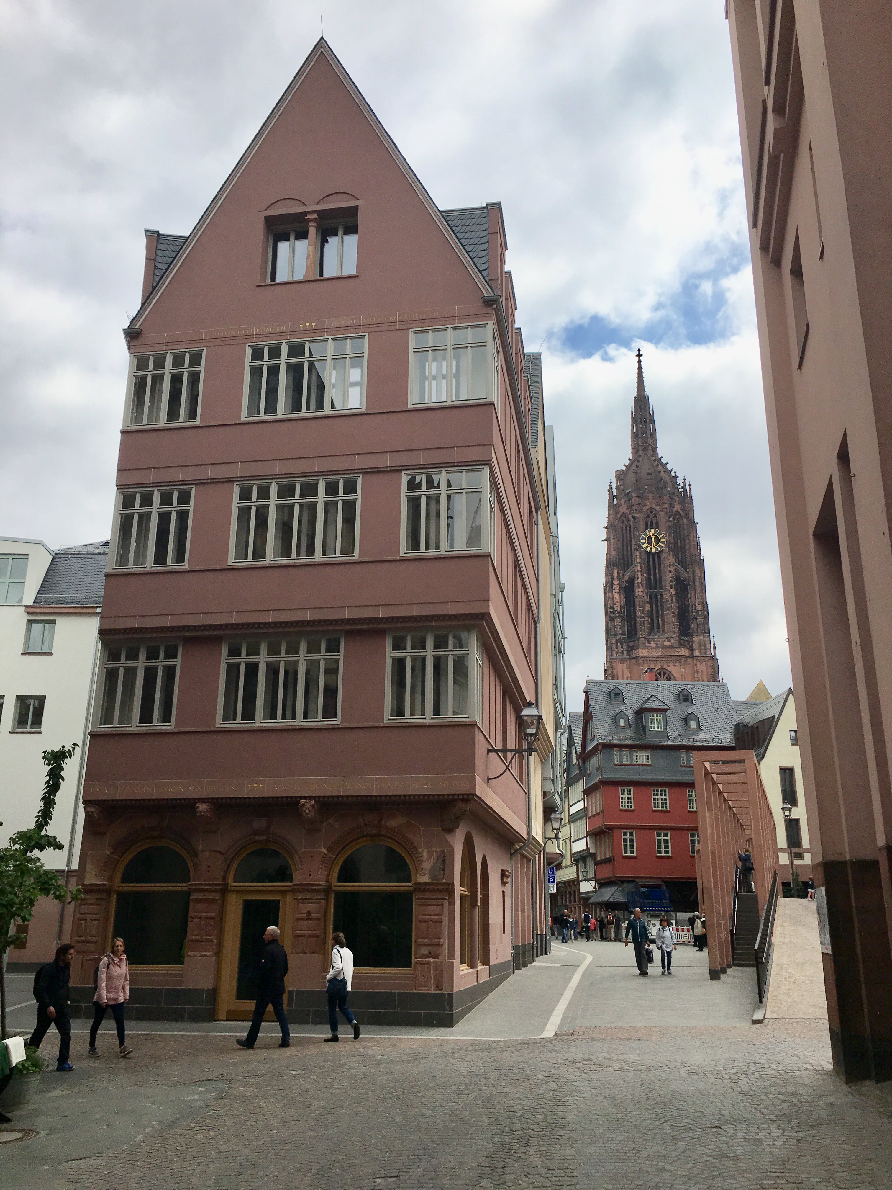 Frankfurt am Main, Markt Blick vom Haus "zu den drei Römern" Richtung Dom